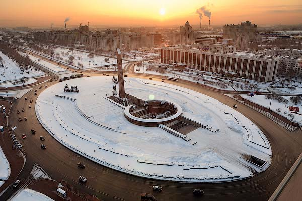 Использование произведения разрешается только при условии указания ссылки на блог автора